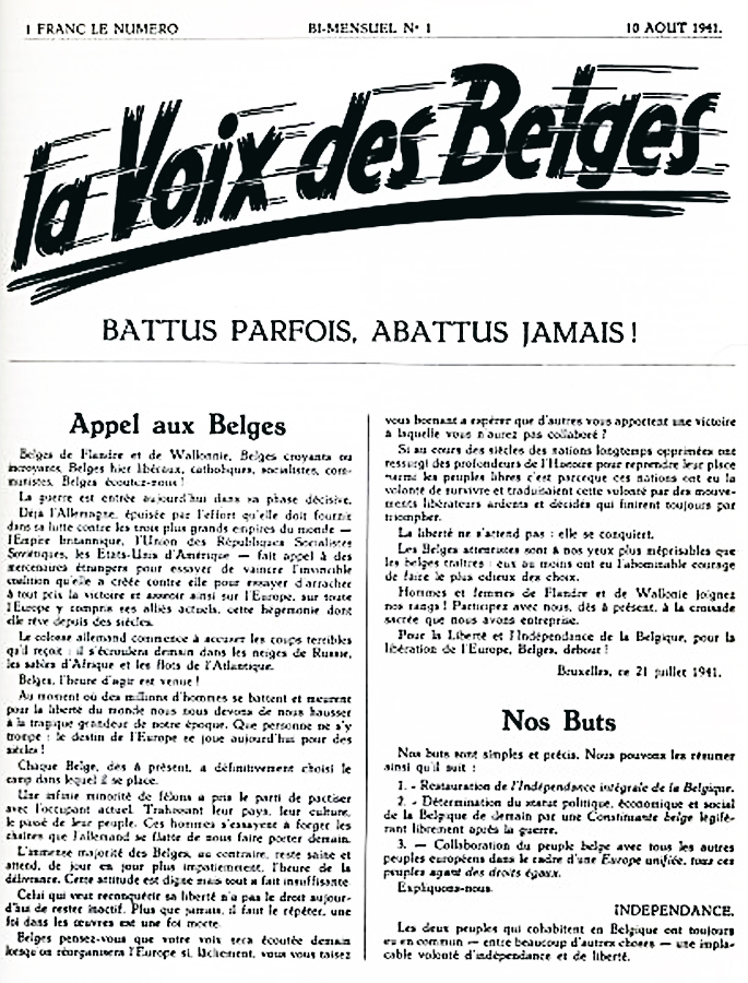 Journal clandestin de la seconde guerre mondiale paru le 10 août 1941.